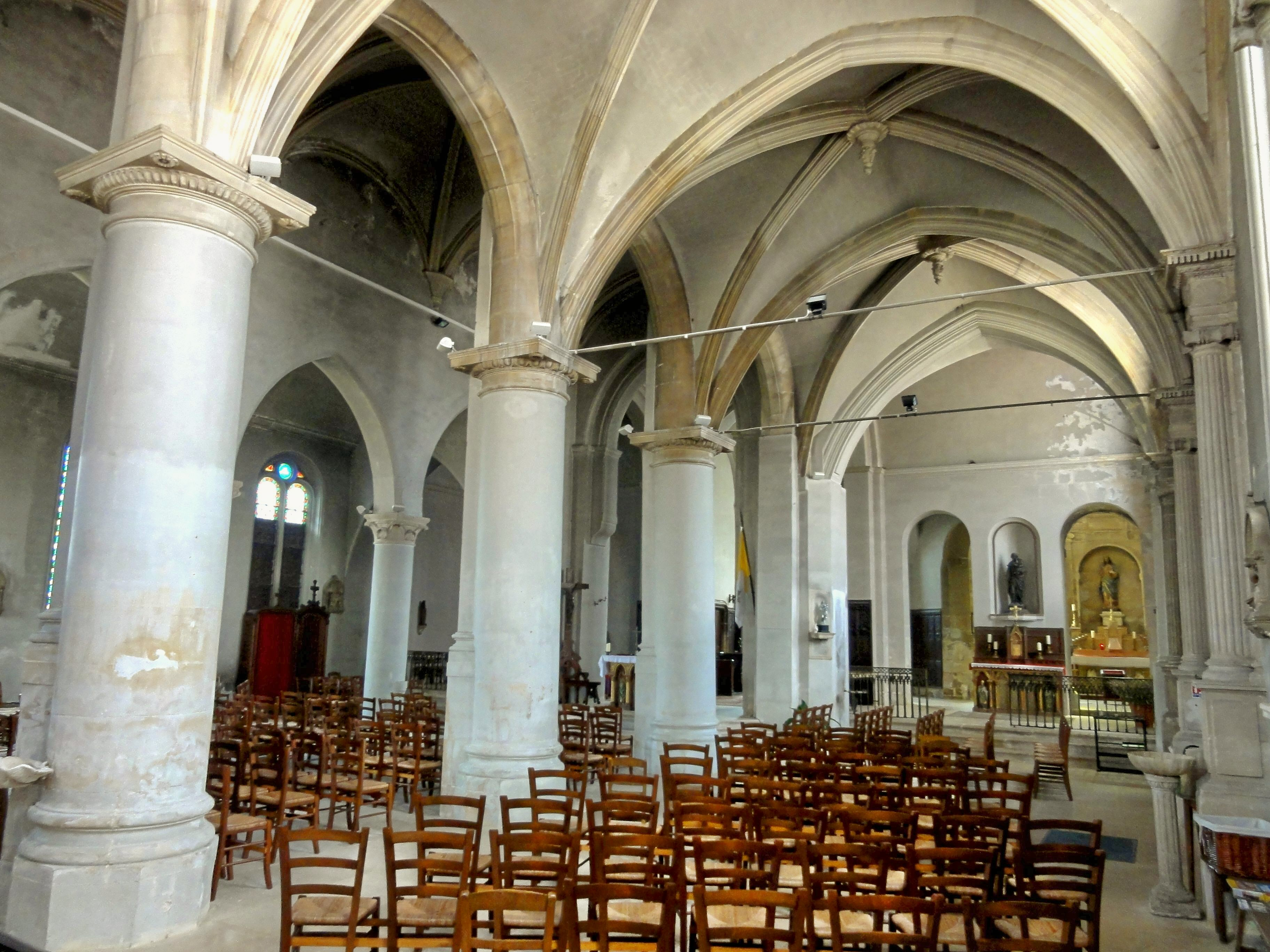 Bas-côté sud, vue vers l'est.